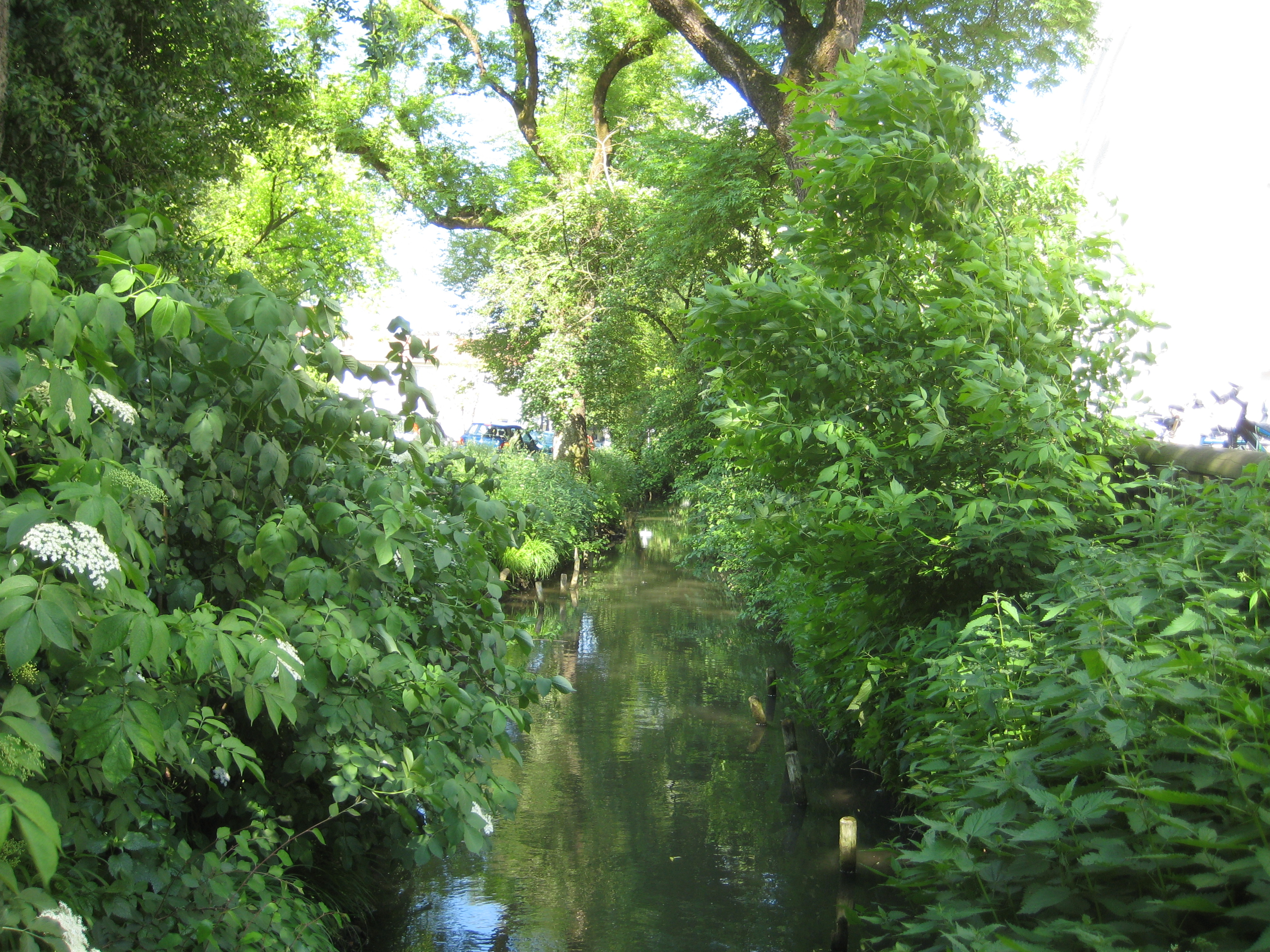 (LSG:BY-LSG-00097.01)_Schutz eines Landschaftsteils in der Stadt Landshut (Restpfettrach)